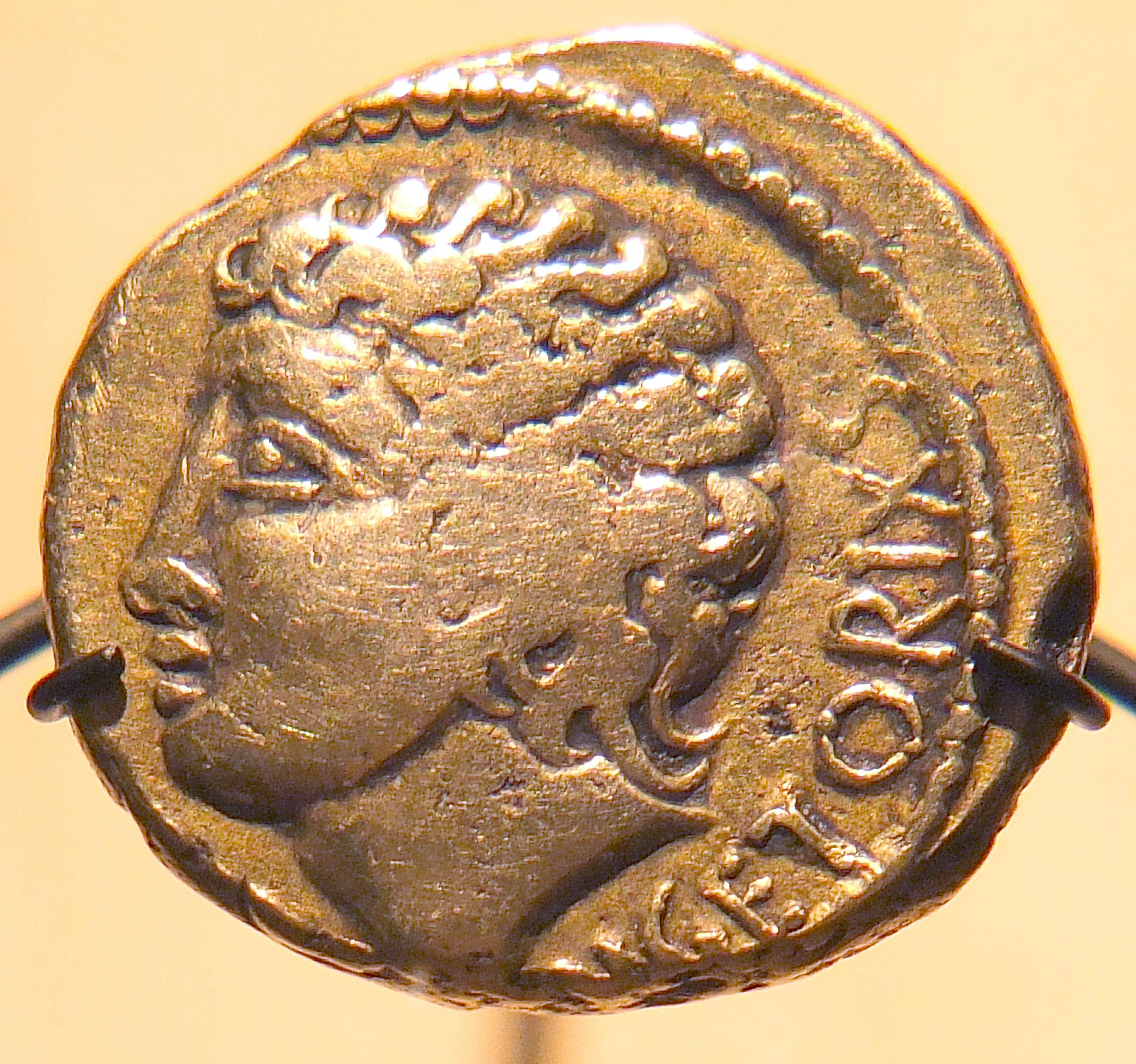 Statère arverne à la légende de (VERCI)NGETORIX(S), or, origine : trésor monétaire de Pionsat N45 - Musée d'archéologie nationale, Saint-Germain-en-Laye (Yvelines).